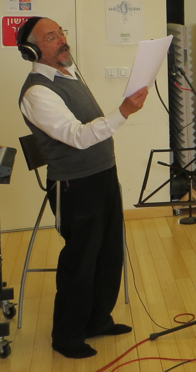 Yoel Drori יואל דרורי